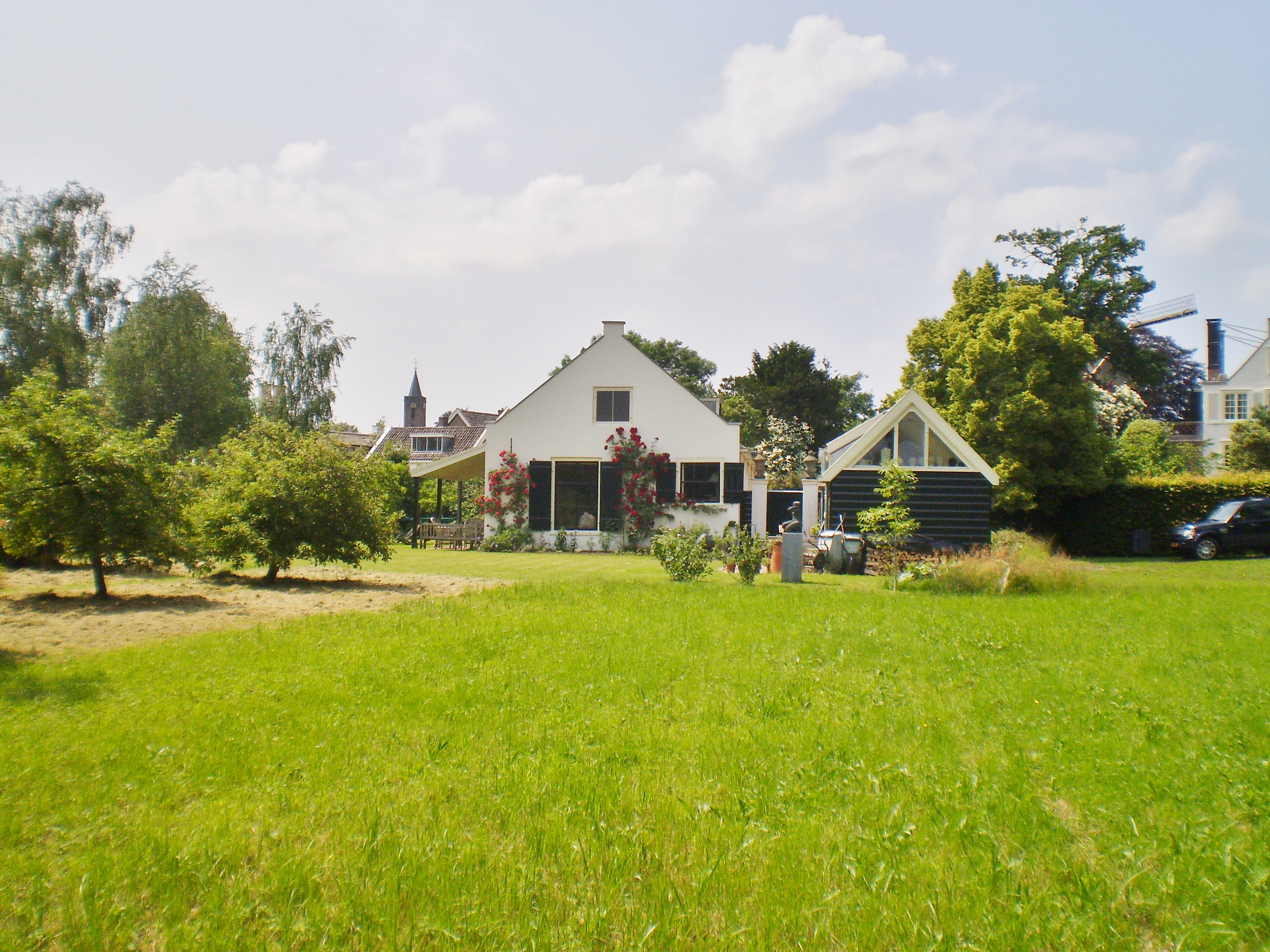 Vecht en Lommer_overtuin in de richting van de Vecht